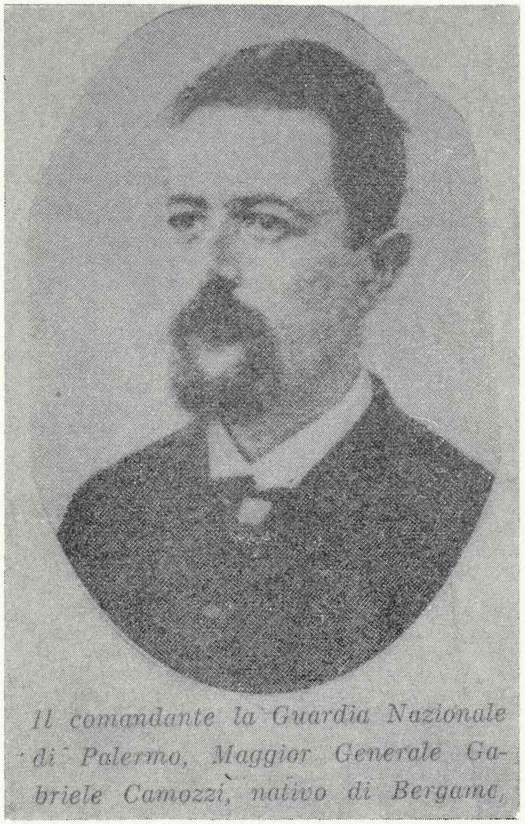 Foto di Gabriele Camozzi (1823-1869)